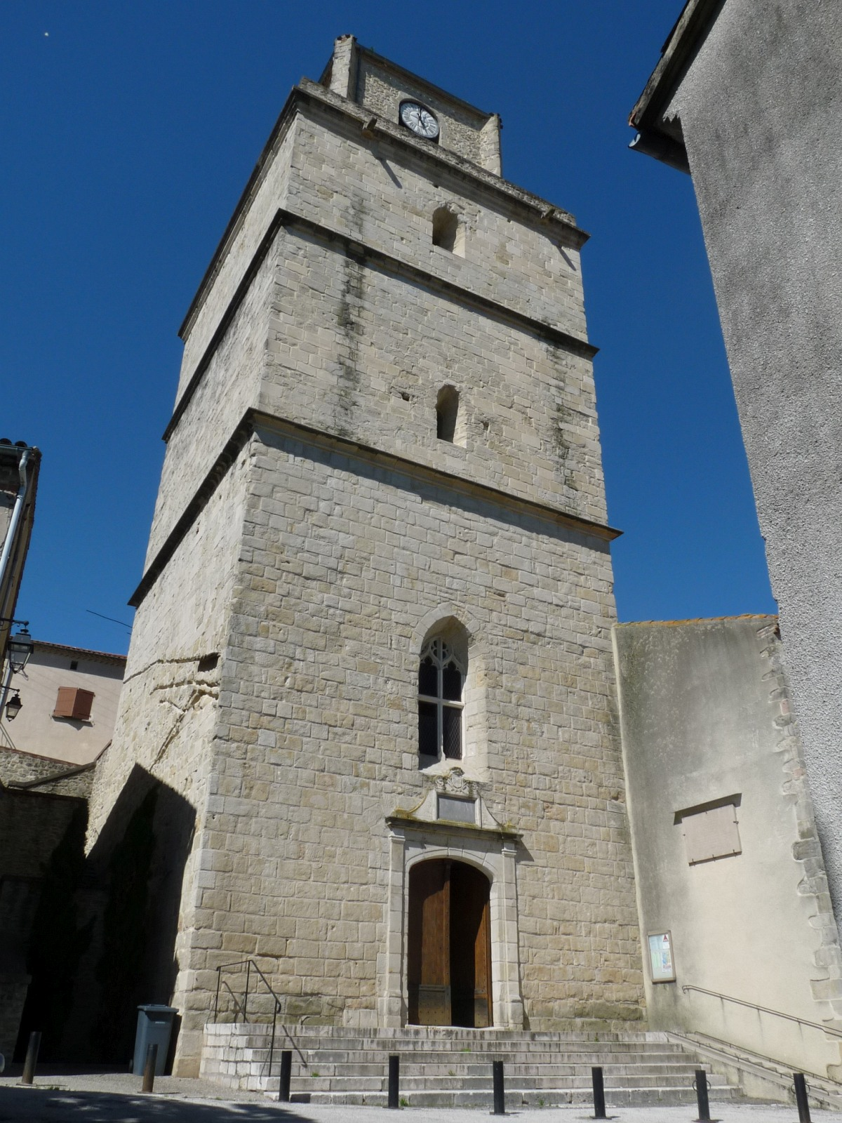 Eglise Sainte-Madeleine d'Auriac-sur-Vendinelle, Haute-Garonne, France